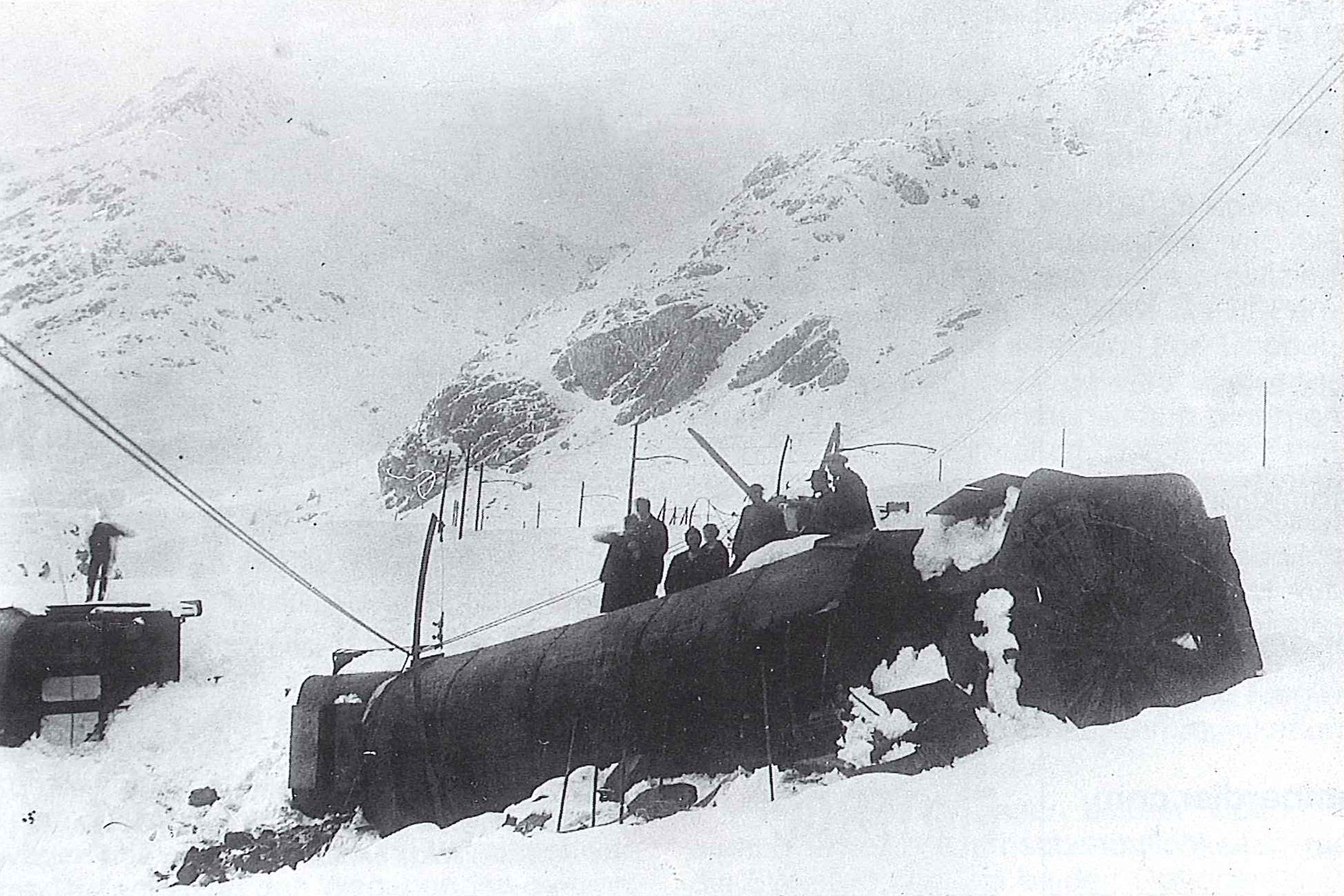 Verschütteter Zug der Berninabahn bei Bernina Hospiz am 16. März 1920. Die Dampfschneeschleuder und die beiden Schiebetriebwagen kippten um.